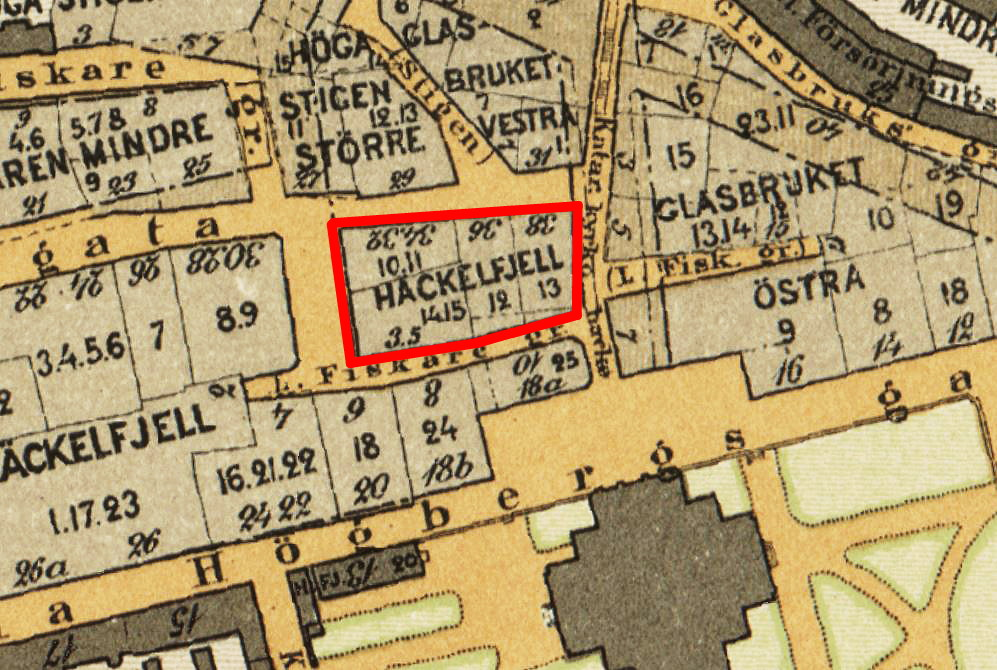 Del av Stockholmskarta visande kvarteret Häckelfjäll (dagens kv Kungen)